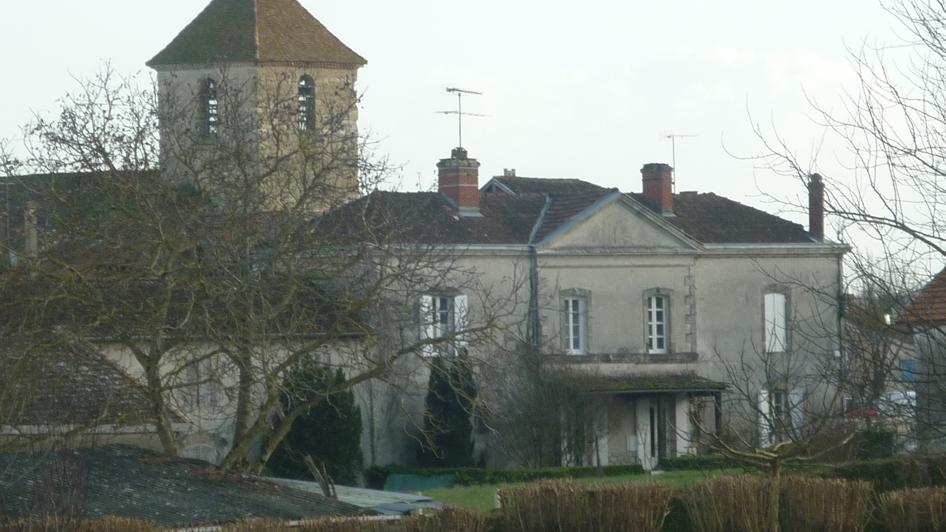 Image de la Maison de la Radio et de la Télévision, siège social de TSF Network en Aquitaine